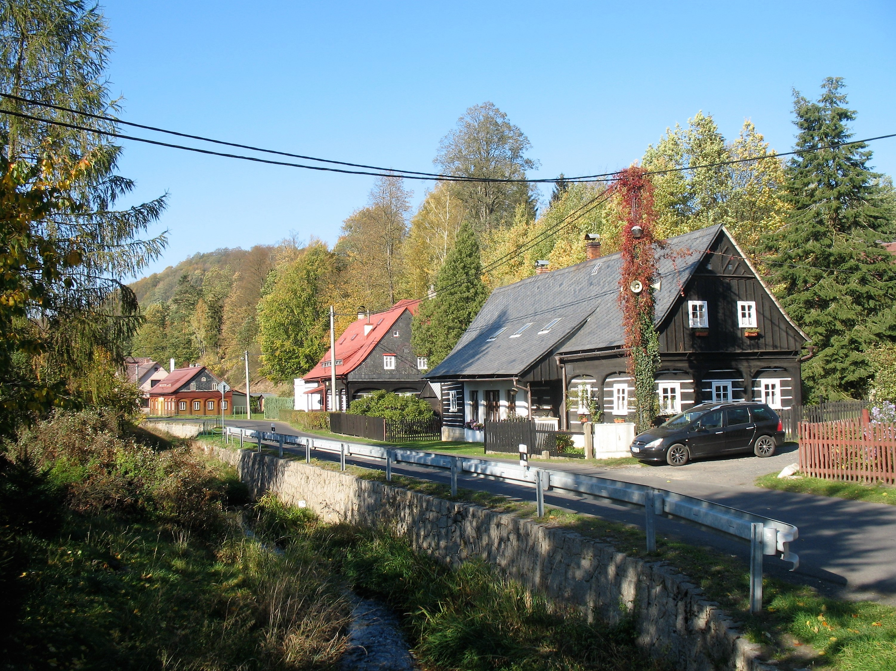 Domy v dolní části Dolní Chřibské (Chřibská, okres Děčín)